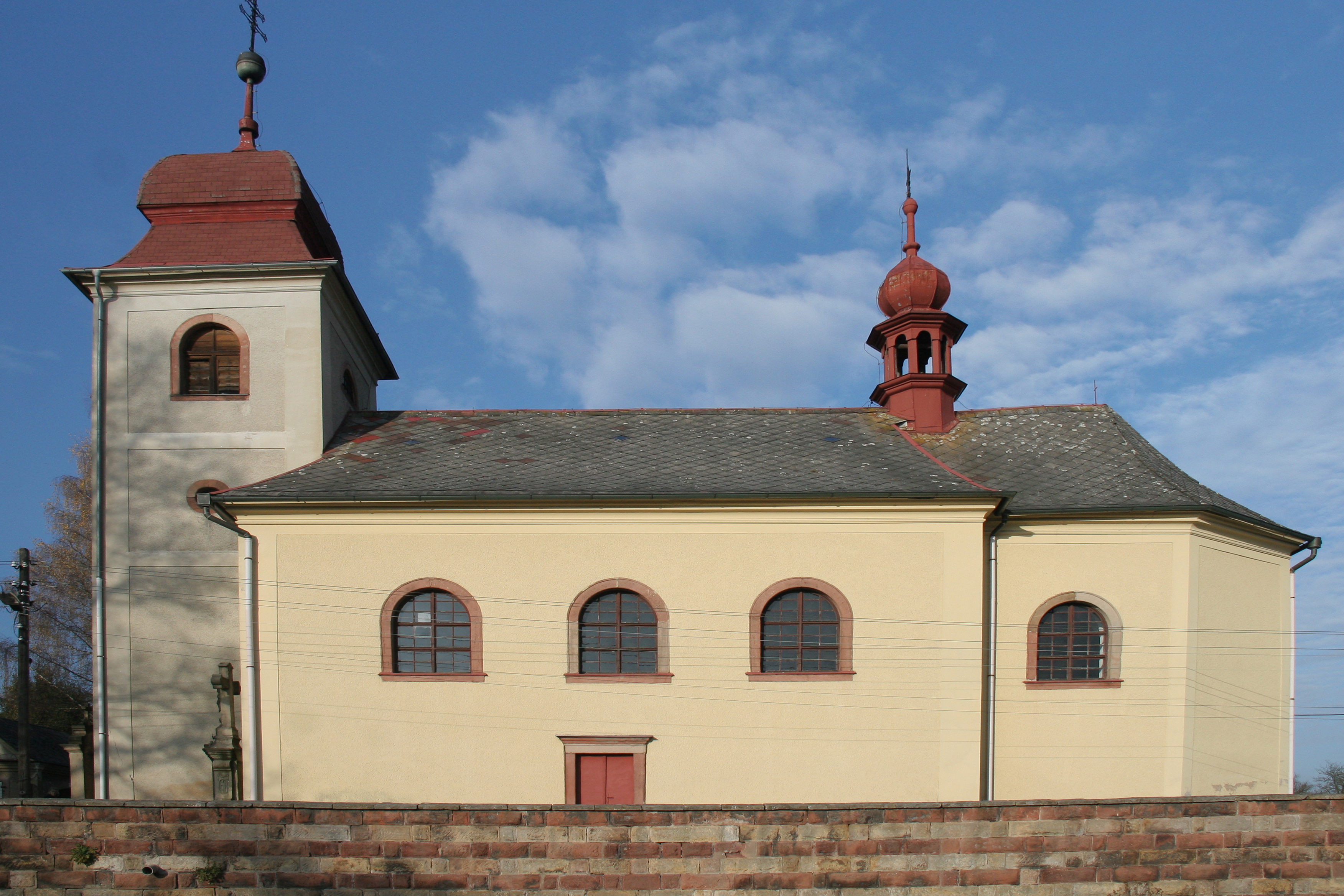 Borovnice kostel